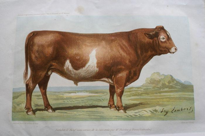 Portrait du Bœuf Gras de race Sarlabot Sarlabot IV fait par Eugène Lambert. Sarazin, Paris / Imp: Zanote, Paris, 17 x 25,5 cm.